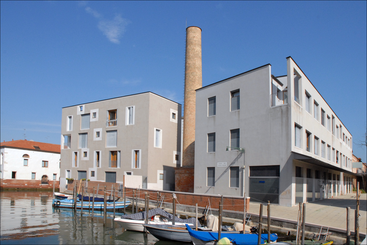 Le nouveau quartier Junghans sur l'île de la Giudecca Les immeubles A2 à droite et les immeubles résidentiels D à gauche (selon le plan de l'architecte Cino Zucchi, 2002) Les immeubles A2 sont des bâtiments industriels rénovés. La cheminée de l'ancienne usine a été conservée pour rappeler l'origine industrielle du quartier. Sur l'île de la Giudecca, le projet Junghans a été un projet de rénovation urbaine de la zone industrielle occupée de 1878 à 1971 par les usines de la société allemande Junghans (instruments de précision, montres, détonateurs,..). La livraison des bâtiments neufs et rénovés conçus par Cino Zucchi a eu lieu en 2002 Sources Le projet Giudecca sur MIMOA Site de l'architecte Cino Zucchi (Milan)